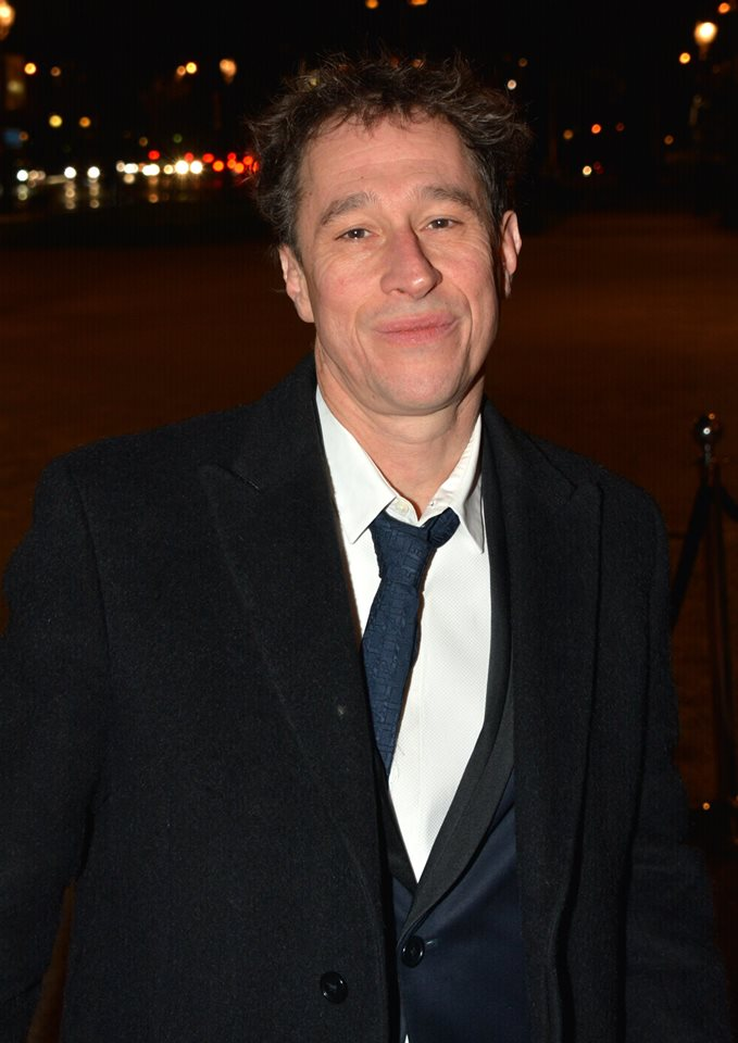 Bertrand Bonello au dîner des révélations des César du cinéma